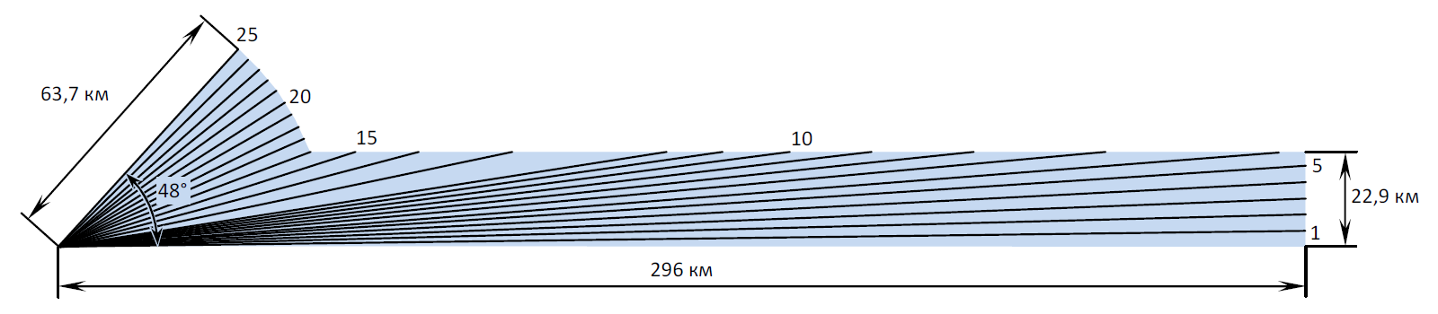 Зона обзора радара AN/SPS-42 по дальности и углу места. Цифрами 1-25 обозначены номера лучей. Шаг по углу места для лучей 1–12 составляет 0,75º, для лучей 13–25 — 3º.